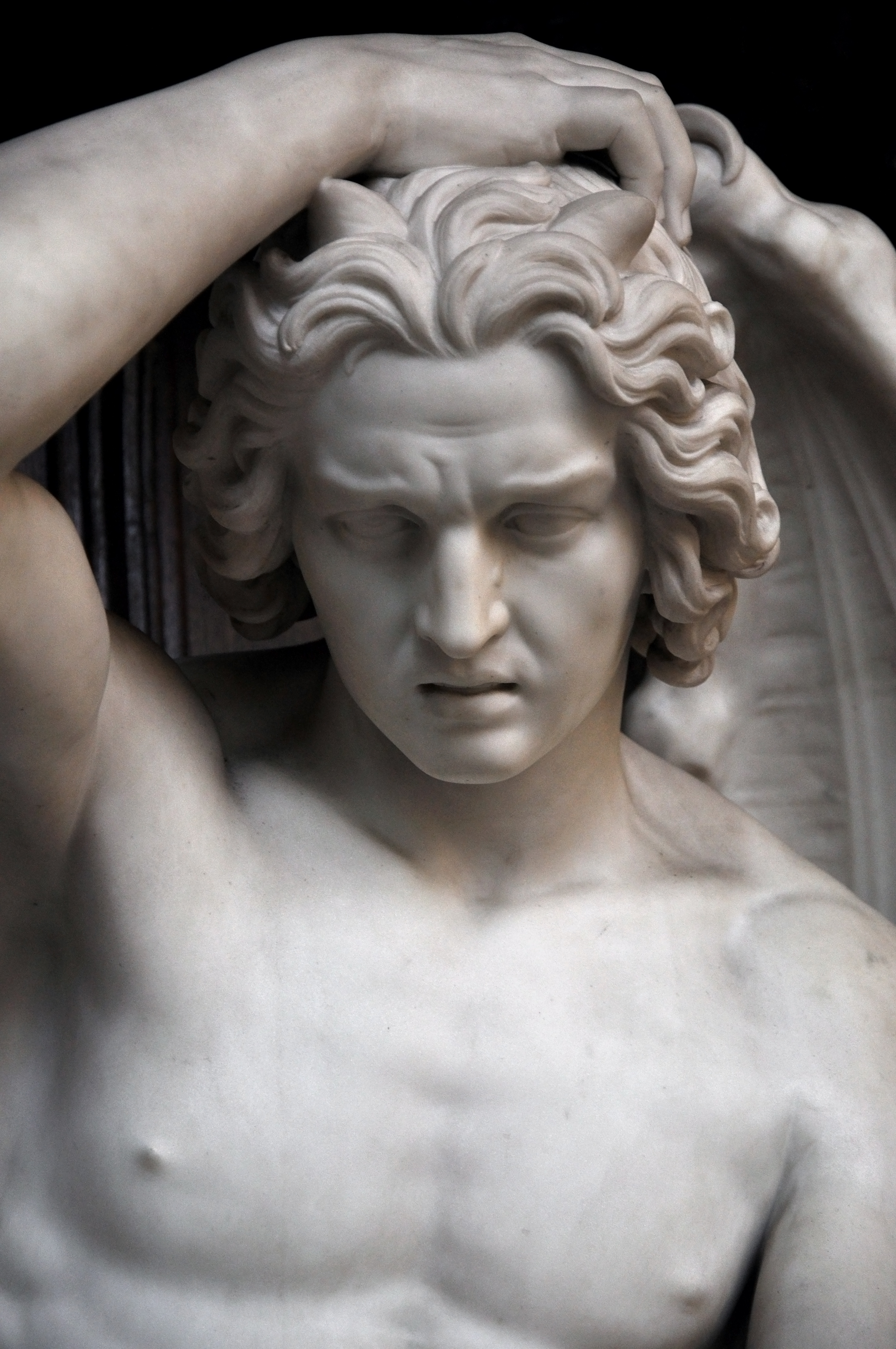 Cathédrale Saint-Paul de Liège; la chaire, par Guillaume Geefs, de style néo-gothique, datant du milieu du 19ème siècle. Détail: Lucifer, au revers de la chaire.